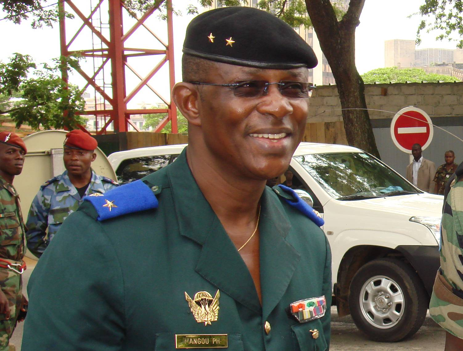 Philippe Mangou, Chef d'Etat-major des Forces armées nationales de Côte d'Ivoire